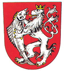 Coat of arms of Děčín Znak města Děčína